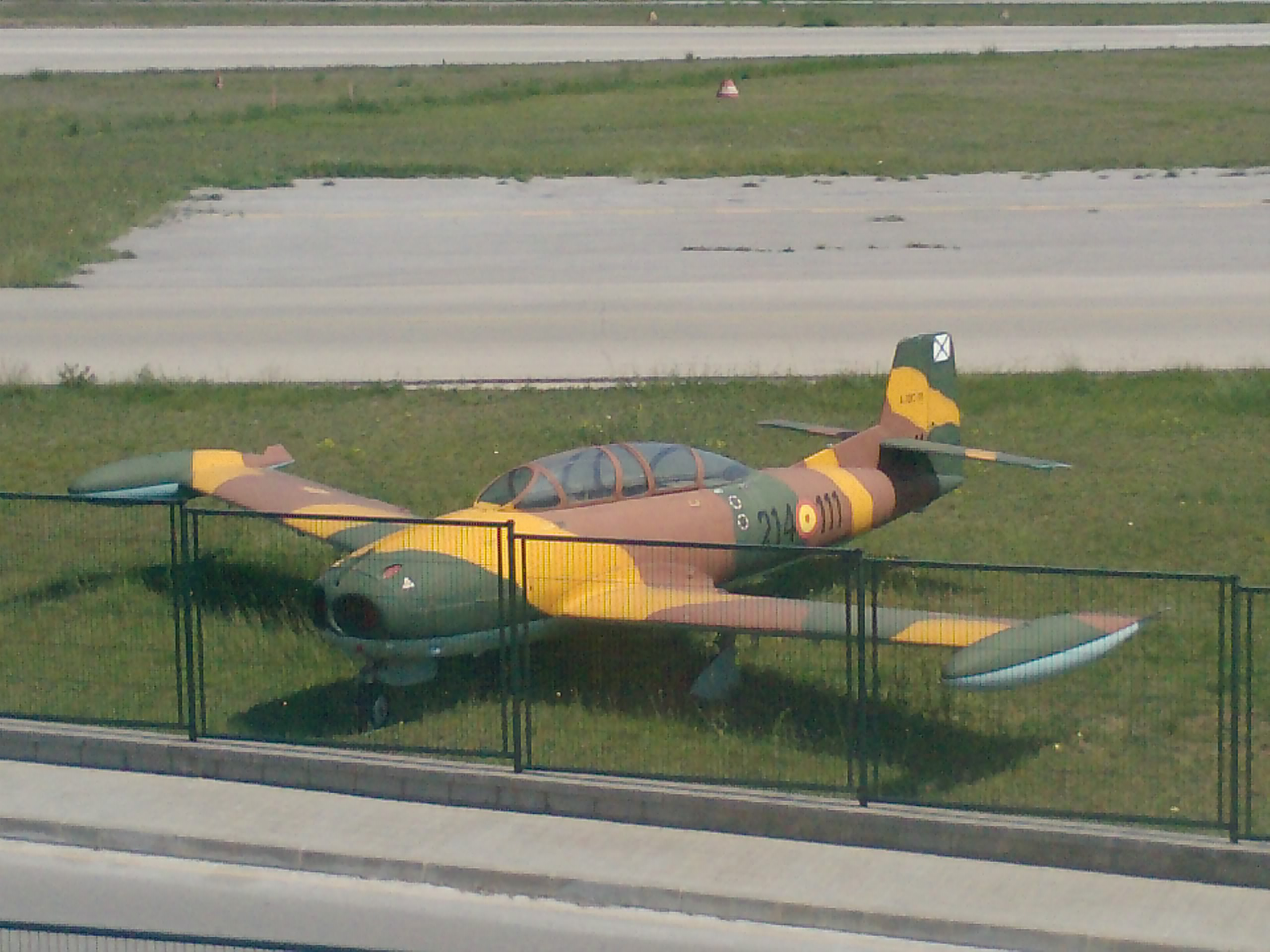 Avión propiedad de la FPAC